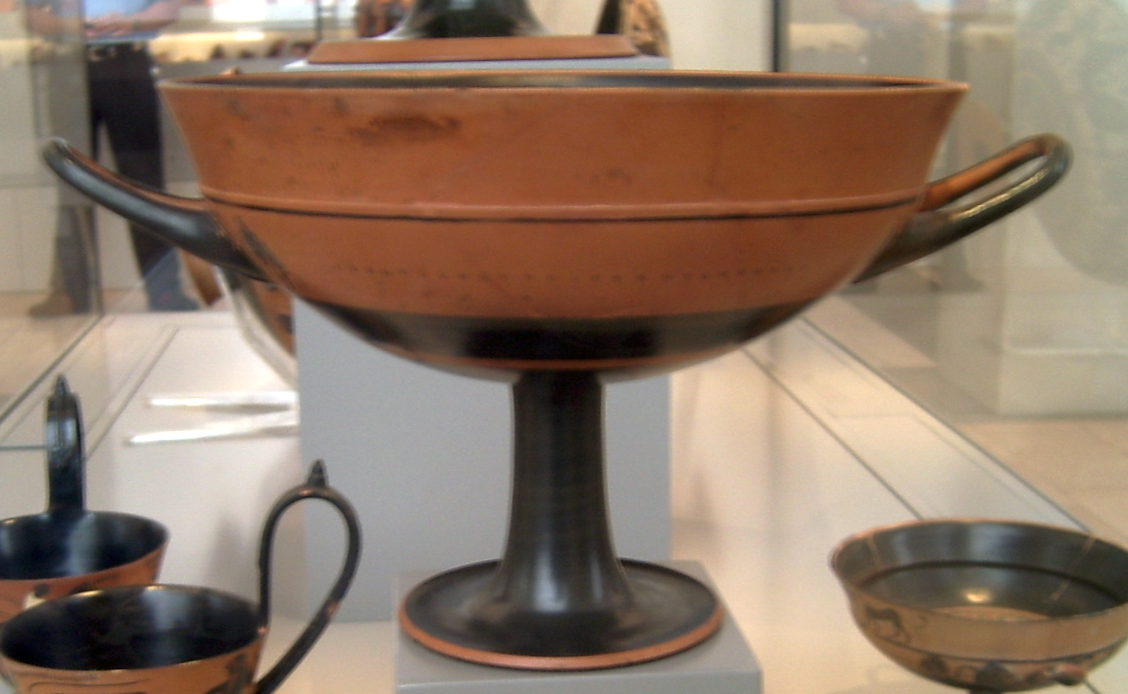 Randschale mit der Signatur des Töpfers Ergoteles, um 540/530 v. Chr., Antikensammlung Berlin/Altes Museum